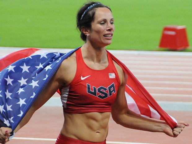 L'américaine Jennifer Suhr: médaille d'or olympique du saut à la perche à Londres